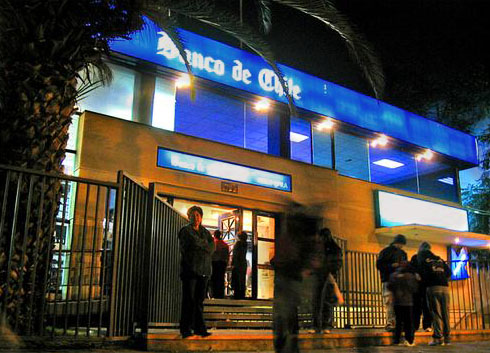 Oficina del Banco de Chile en Maipú, durante la Teletón 2006